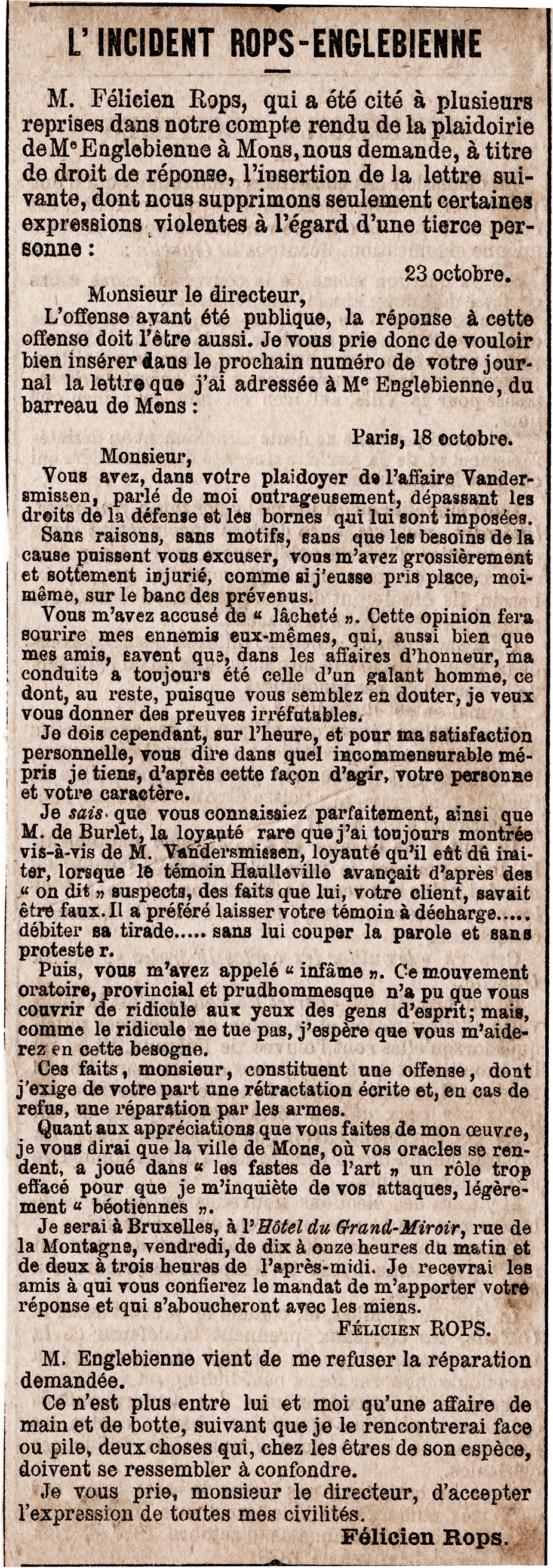 Dans le cadre de l'affaire Vandersmissen, Félicien Rops use d'un droit de réponse pour interpeler l'avocat de Gustave Vandersmissen, maître Englebienne - in La Réforme - 24 octobre 1886